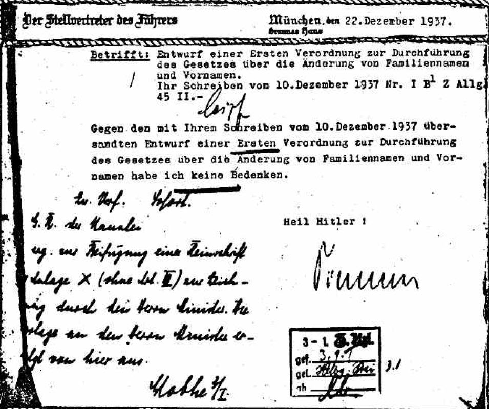 Hans Globkes Entwurf für ein judenfeindliches Gesetz über die Änderung von Familiennamen vom 10. Dezember 1937 wird freigegeben. Faksimile nach Abdruck im Neuen Deutschland vom 5. Dezember 1960.